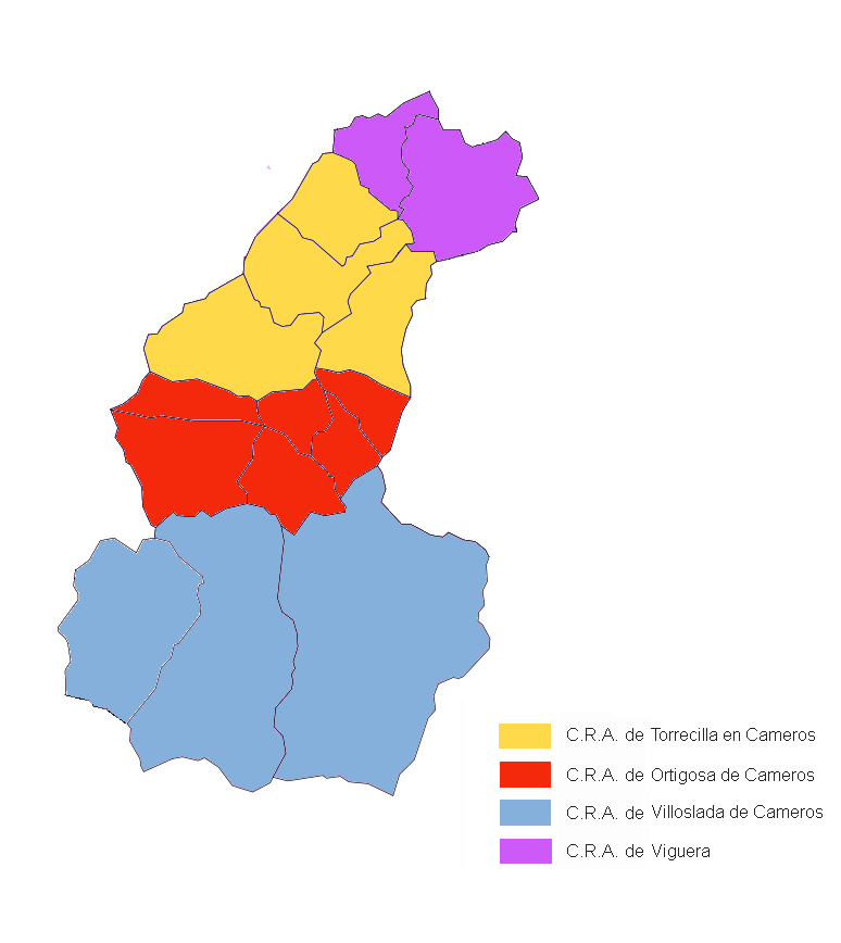 Distribución de los colegios en el Camero Nuevo